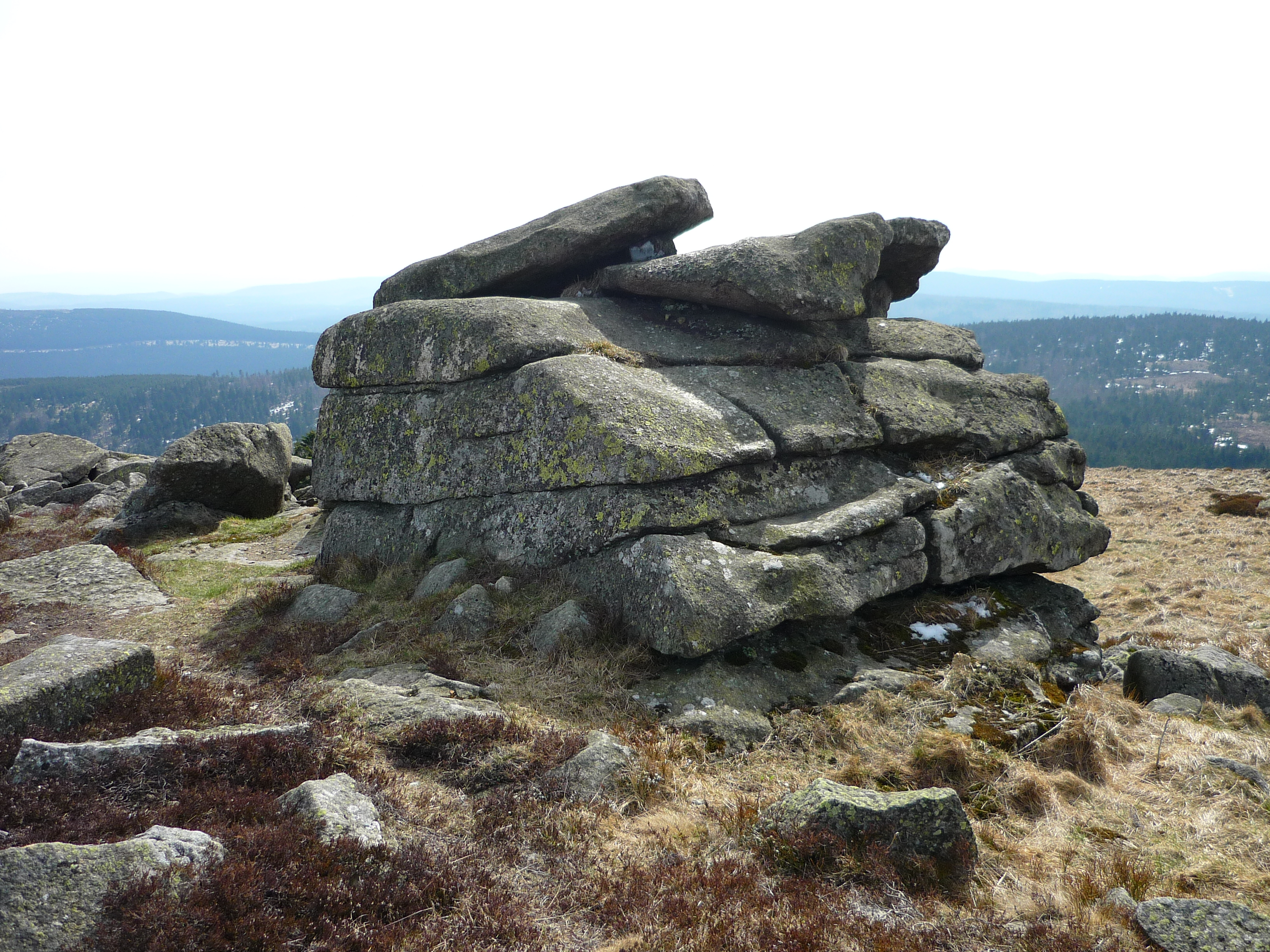 Mystische Stätten: Felsen „Teufelskanzel“ auf dem Brocken